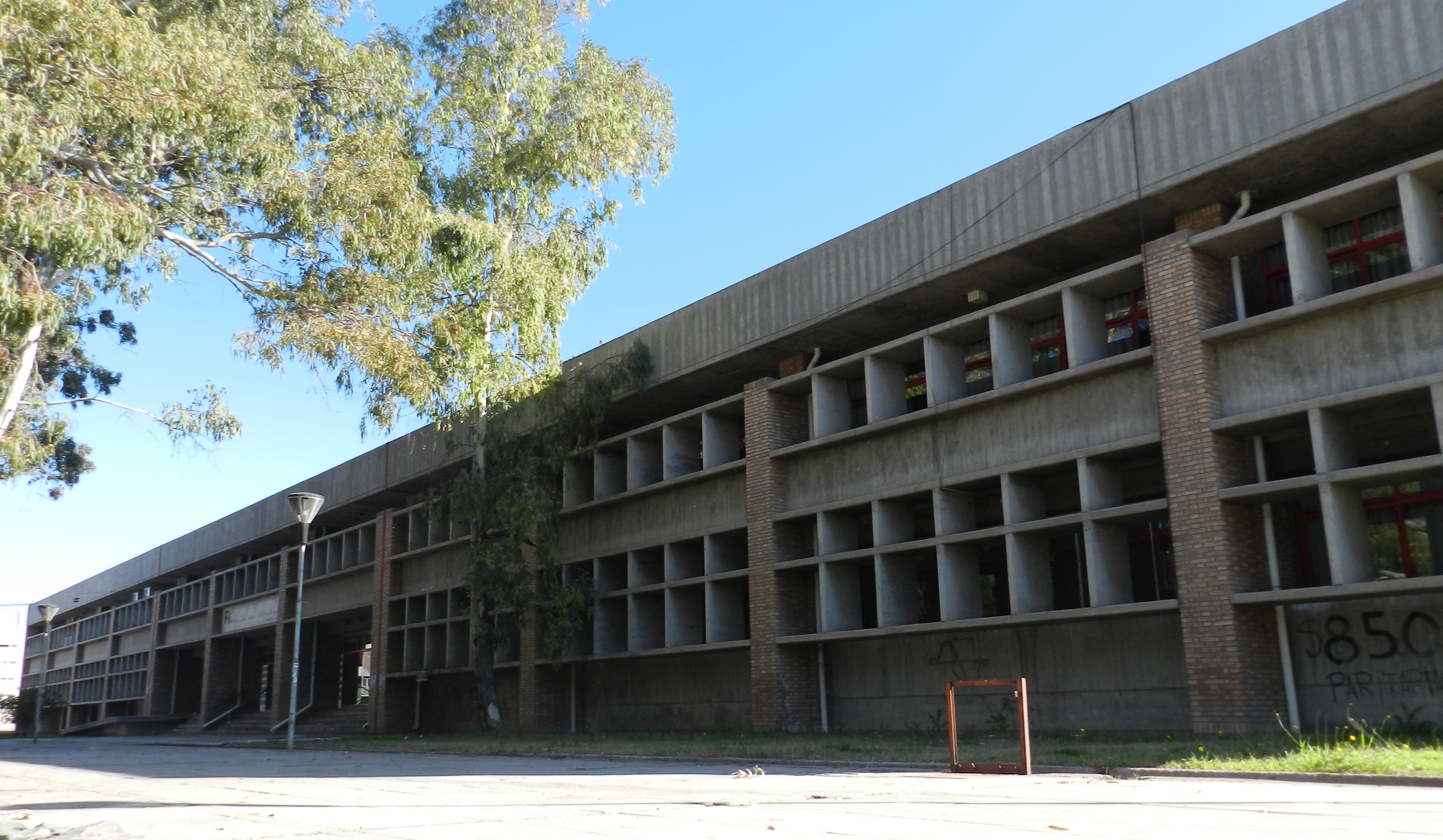 Aulas de la Facultad de Ingeniería UNCuyo